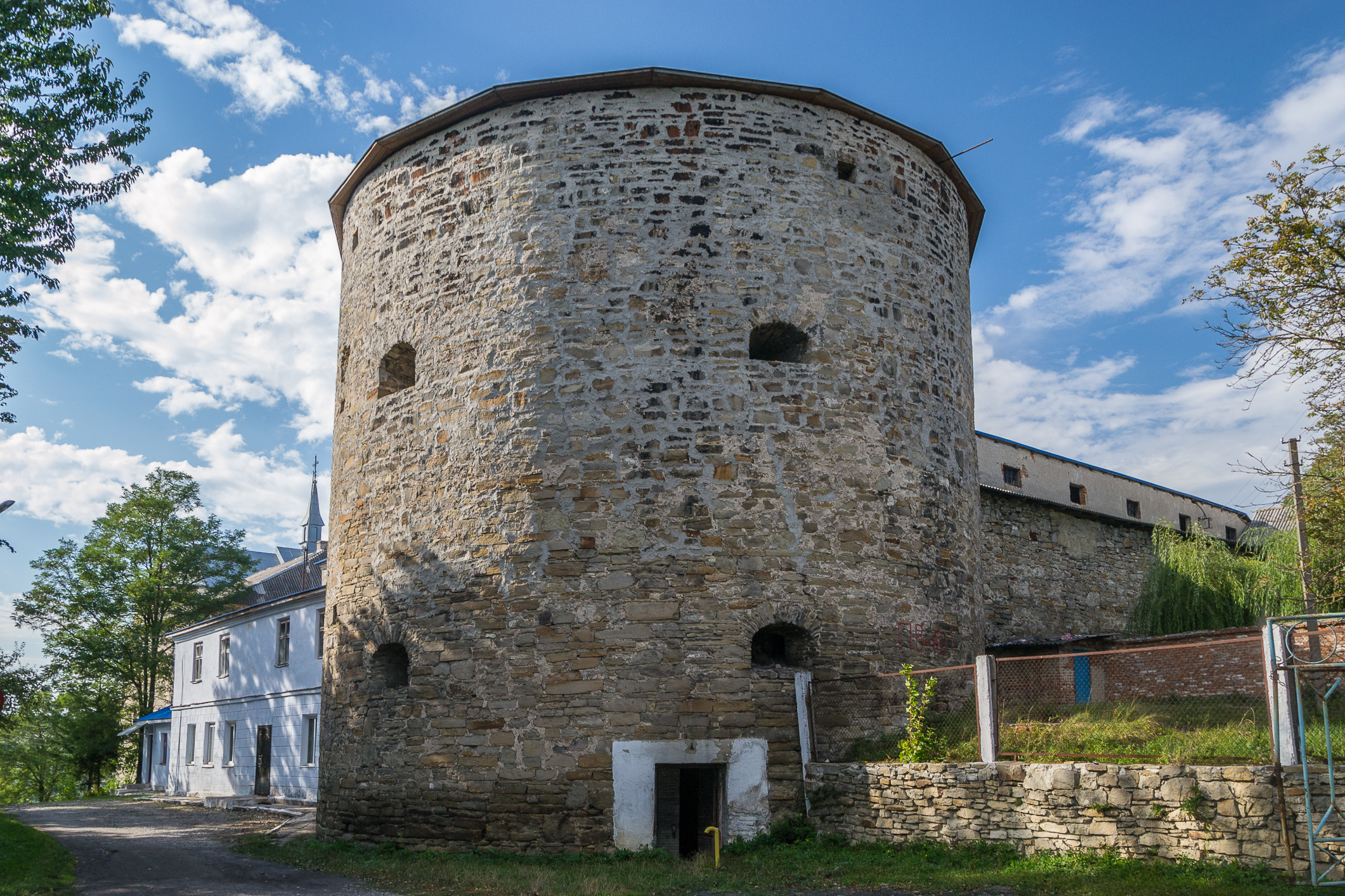 Замок (мур.), село Буданів